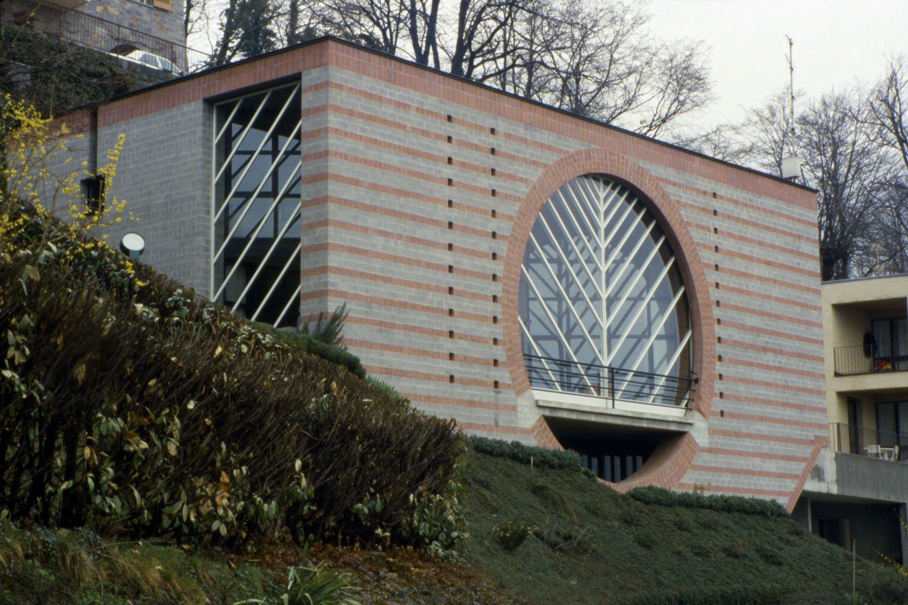 Massagno, Casa Robbiani (arch. Mario Botta 1979-81)